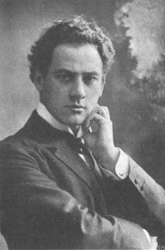 Oskar Beregi (1876-1965) Ungarischer Schauspieler. Hungarian Actor. Magyar színész.